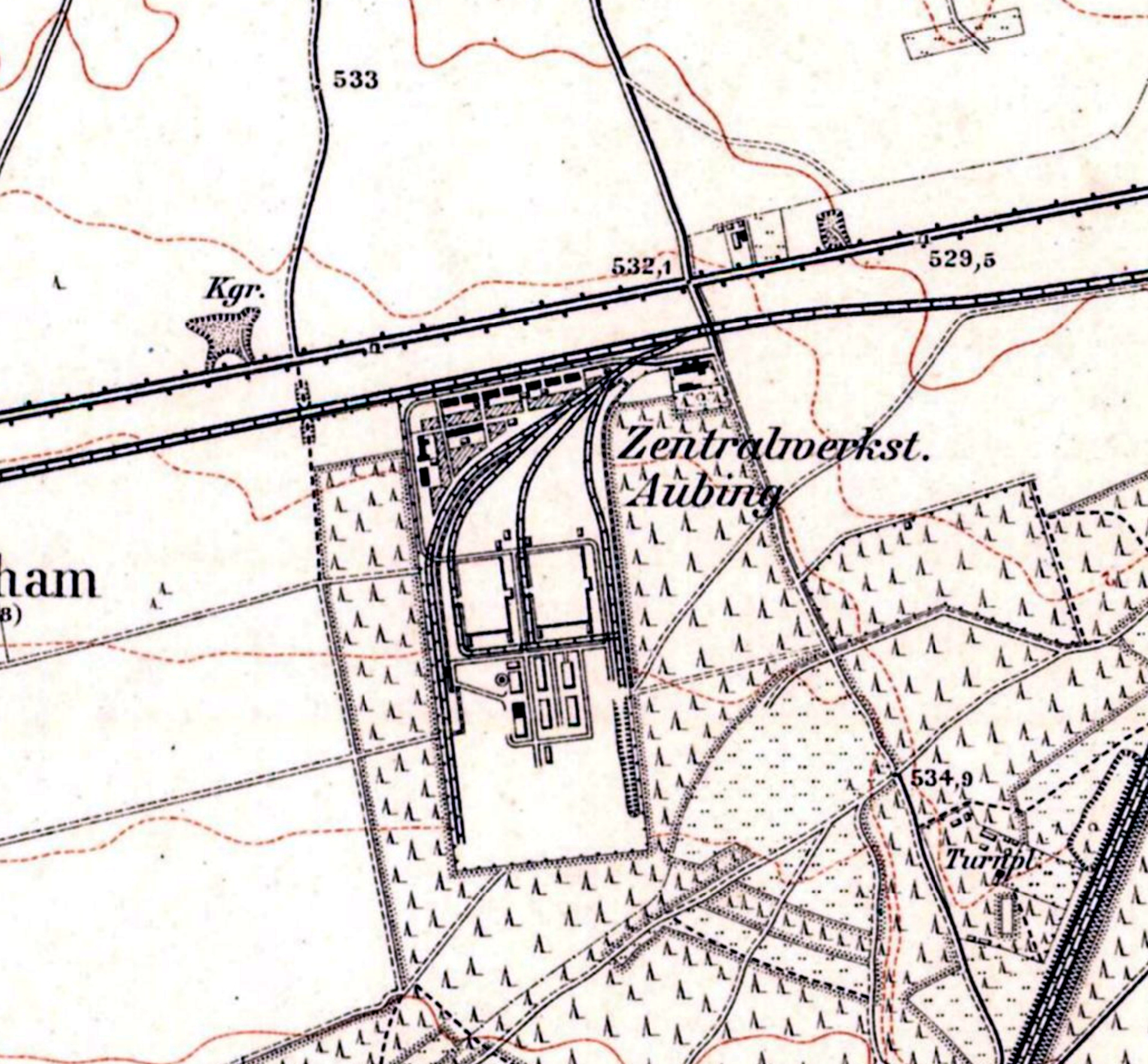 Karte der Centralwerkstätte Aubing der Königlich Bayerischen Staatseisenbahnen sowie des benachbarten Ausbesserungswerks der Compagnie Internationale des Wagons-Lits, zusammengesetzt aus diversen Blättern der Topographischen Karte Bayern 1:25.000 aus den Jahren 1907–1914